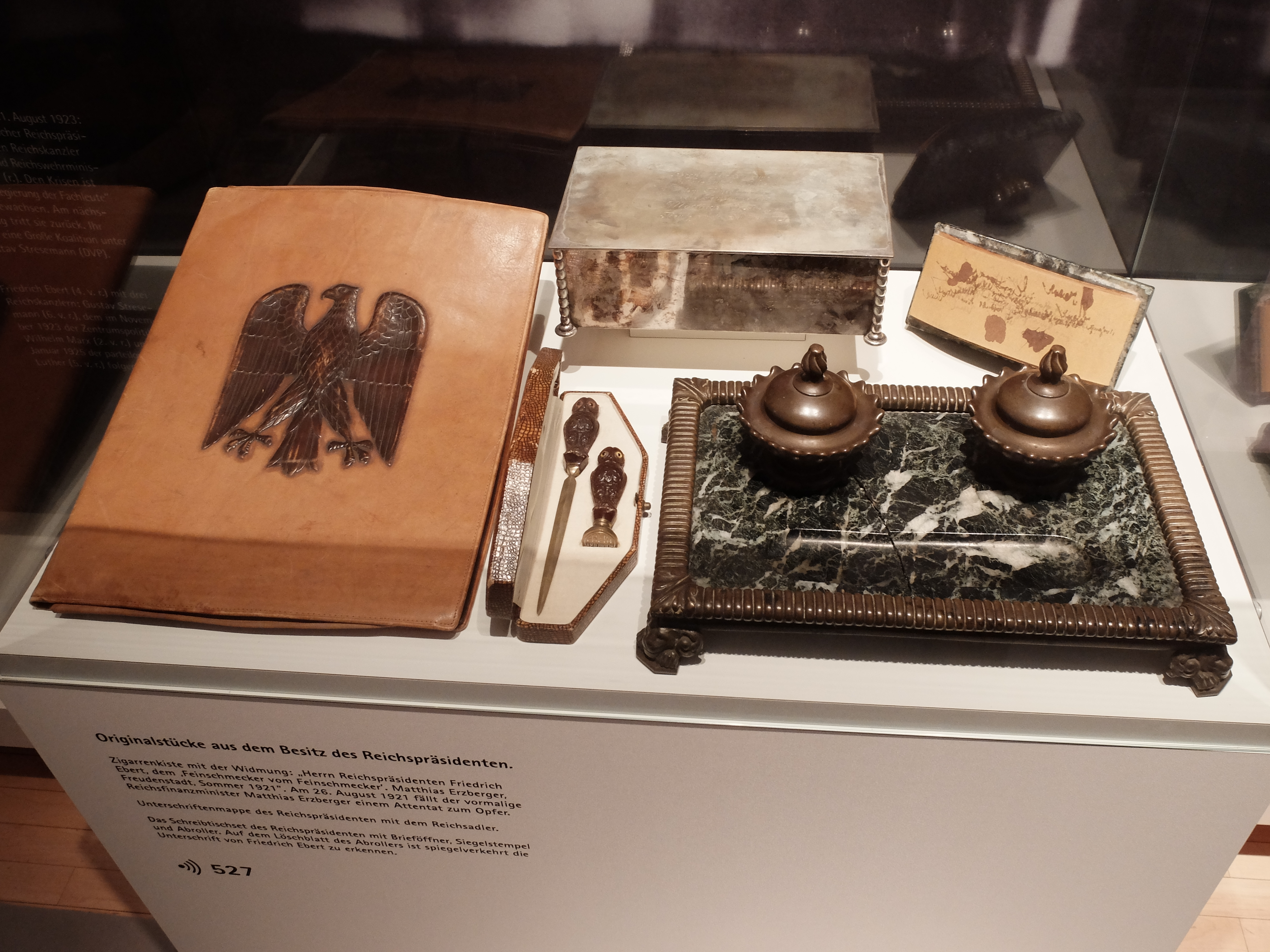 Utensilien des Reichspräsidenten Friedrich Ebert, Gedenkstätte in Heidelberg. Zigarrenkiste, Unterschriftenmappe, Brieföffner